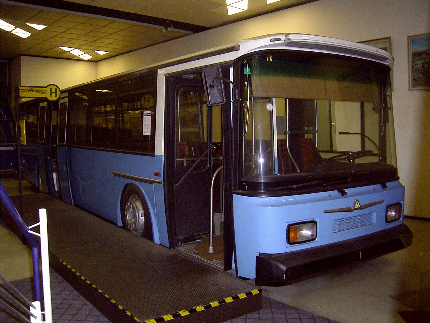 Neoplans erster Niederflurbus N 814 im Neoplan-Museum Stuttgart-Möhringen fotografiert von Tilius 5.1.2006